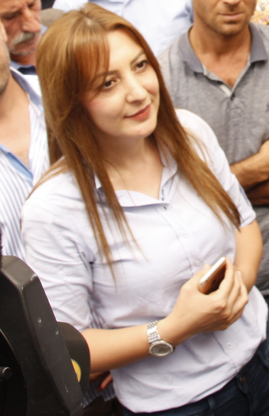 Birlik 90Yeşiller eşbaşkanı Cem Özdemir'in Leyle İmret ile görüşmesi